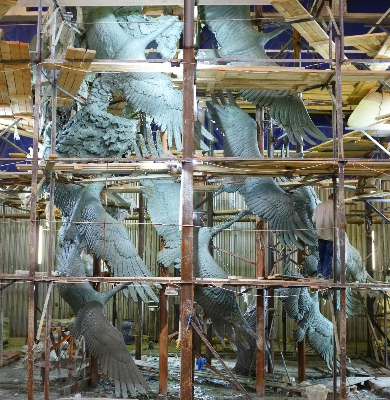 Ржевский мемориал советскому солдату. Журавли. Нижняя часть. Скульптор — Андрей Коробцов, архитектор — Константин Фомин. 2019 г.